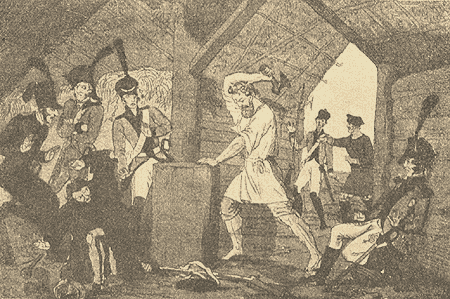 «Русский Сцевола, лишающий себя руки, чтобы не служить Наполеону, врагу отечества... Происшествие, случившееся к славе Россиян в 1812 году во время вторжения французов в Россию». (И. Иванов, изд. 11 января 1813 г.).